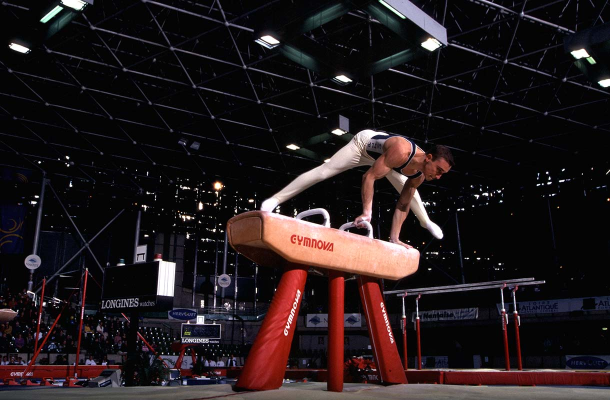 Sébastien TAYAC Chpt. d'Europe des Clubs NANTES 8-9/12/01